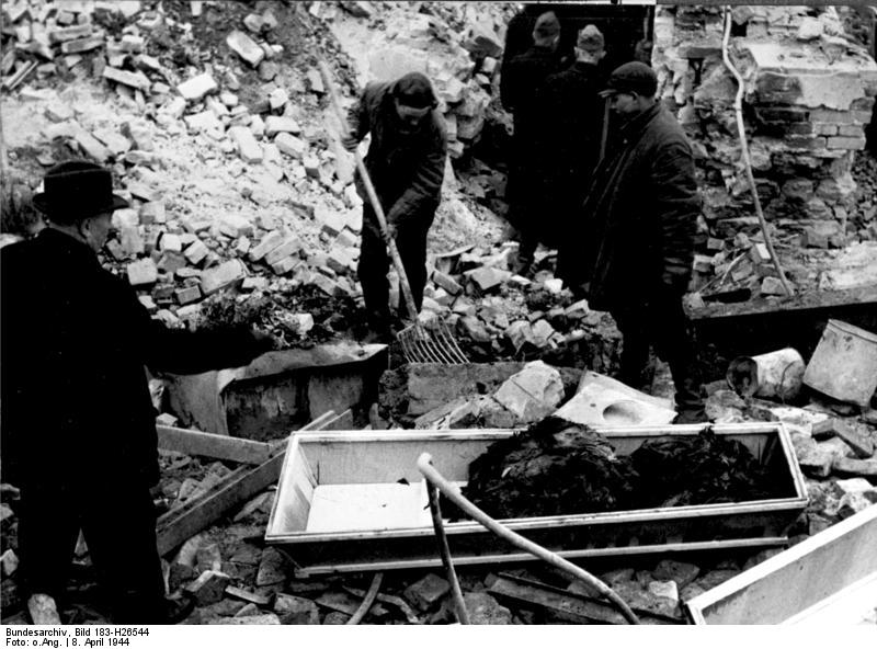 Berlin, Bergung von Opfern nach Luftangriff Zentralbild II.Weltkrieg 1939-45 Am 8.4.1944 werden in Berlin nach einem schweren Luftangriff aus den Kellern die verkohlten Leichen geborgen.